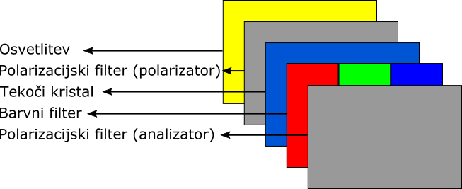 shema LCD zaslona